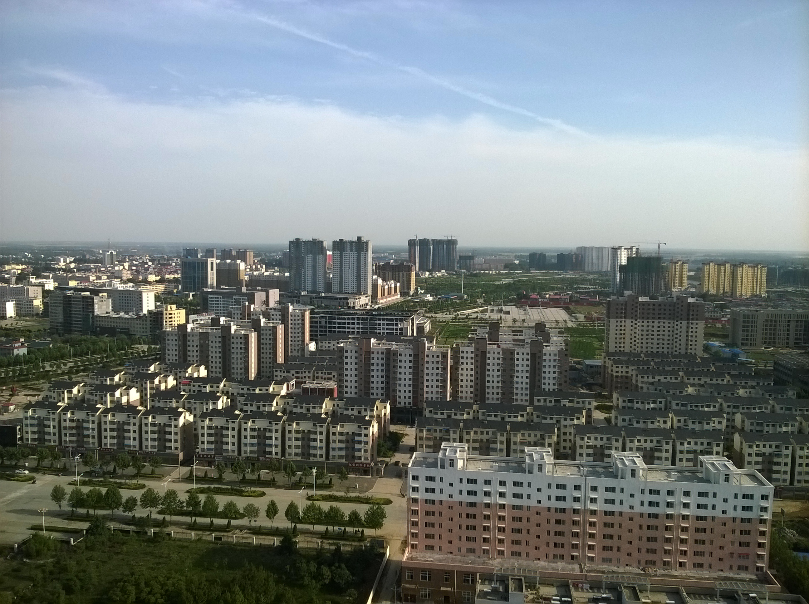 中文（中国大陆）: 俯视社旗县